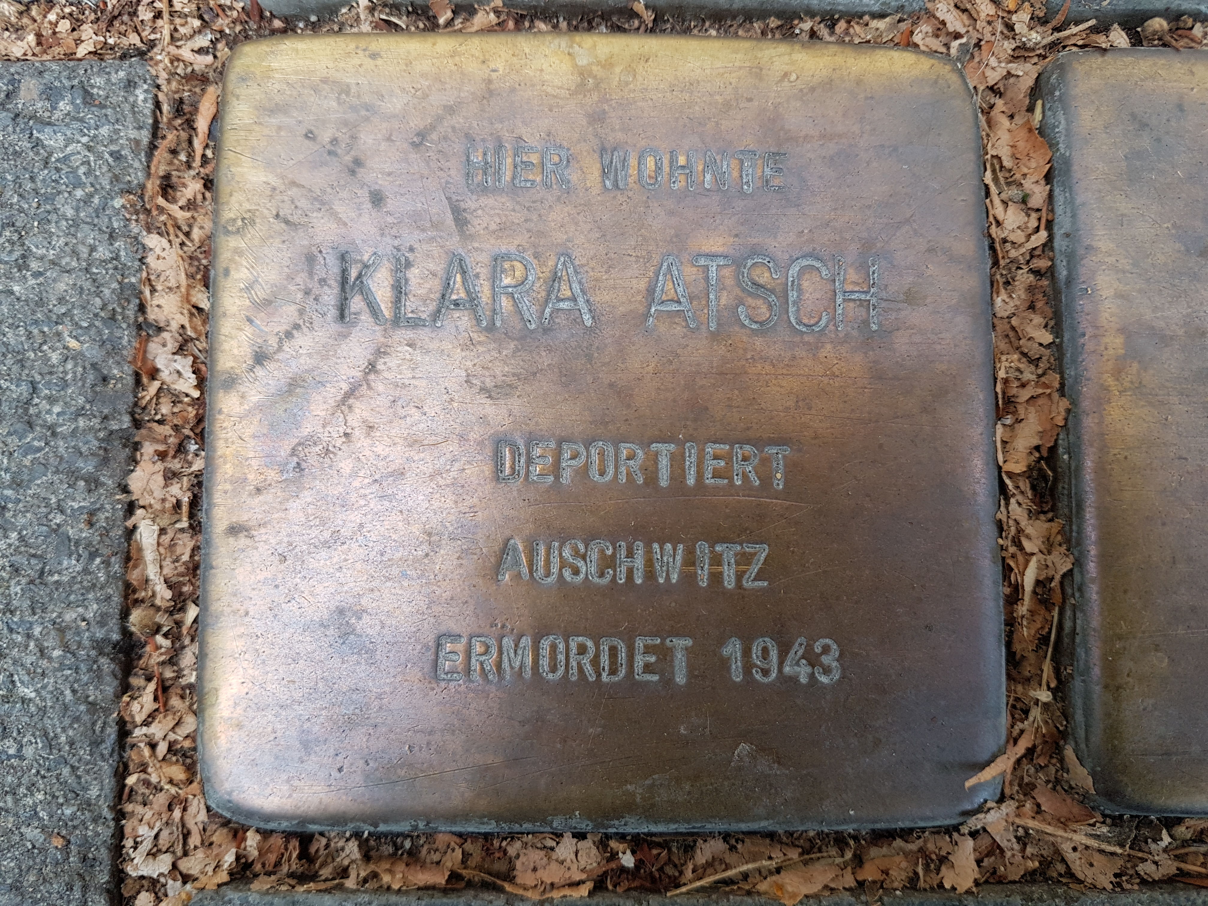 Stolperstein Duisburg Klara Atsch